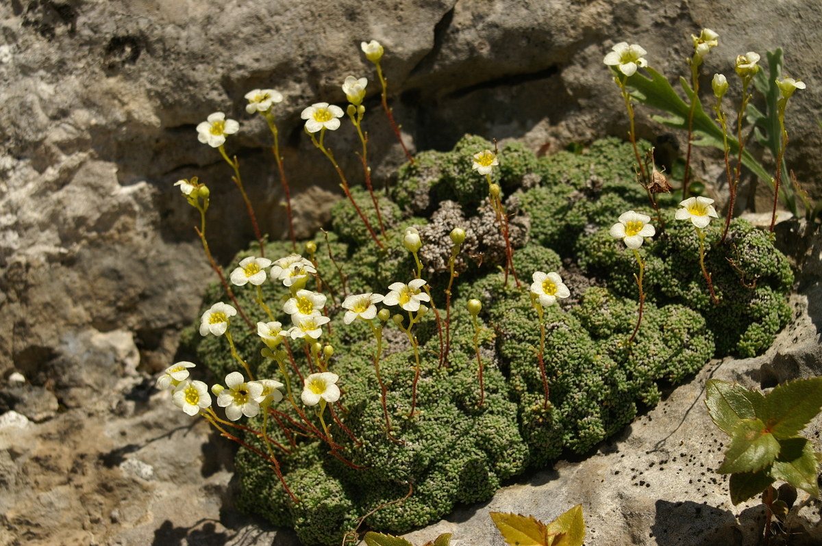 Nasršeni kamnokreč pod Rjavino.